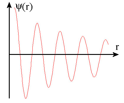 bolgolf